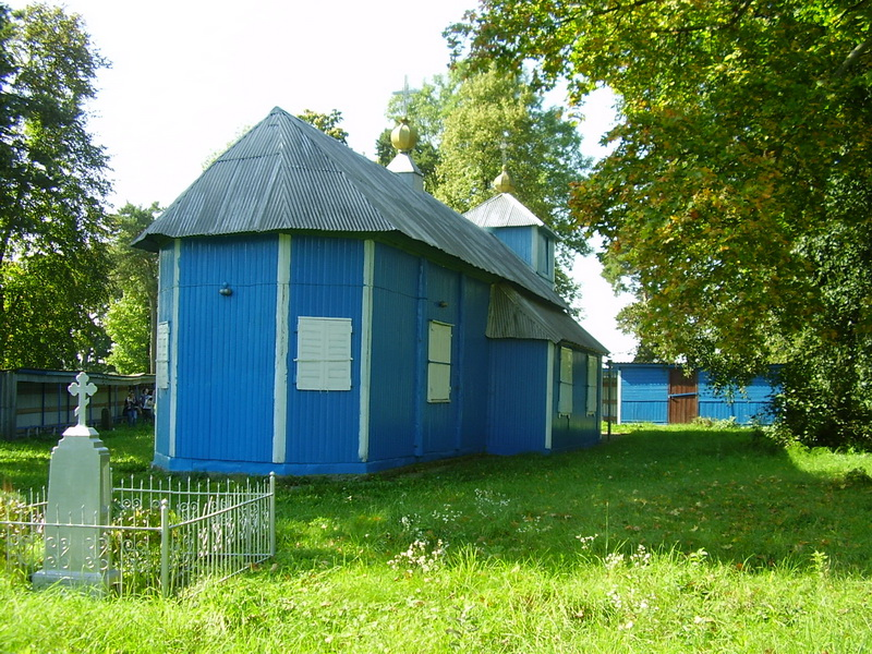 Воўпа. Драўляная царква